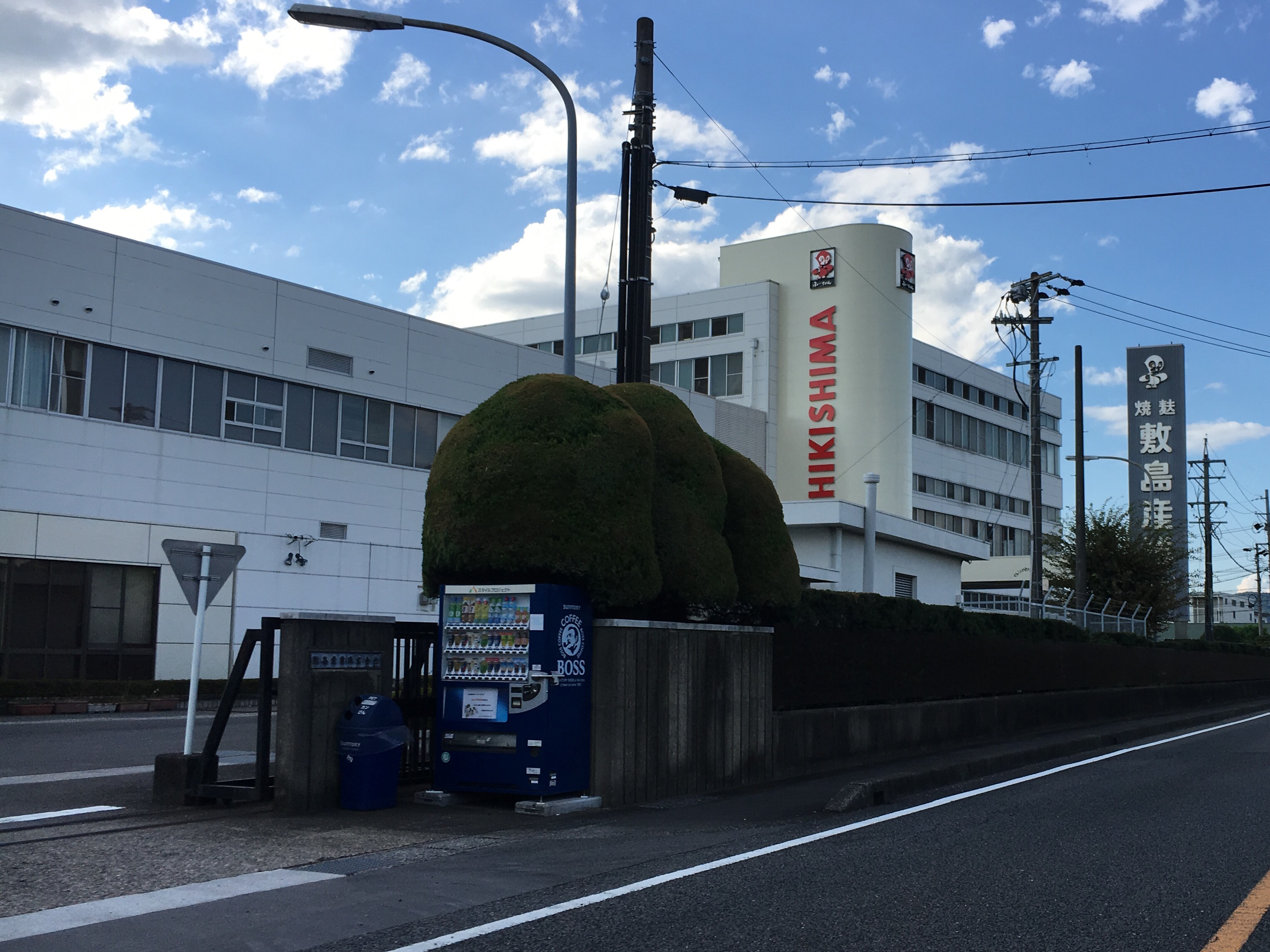 岐阜県本巣市にある敷島産業の本社外観